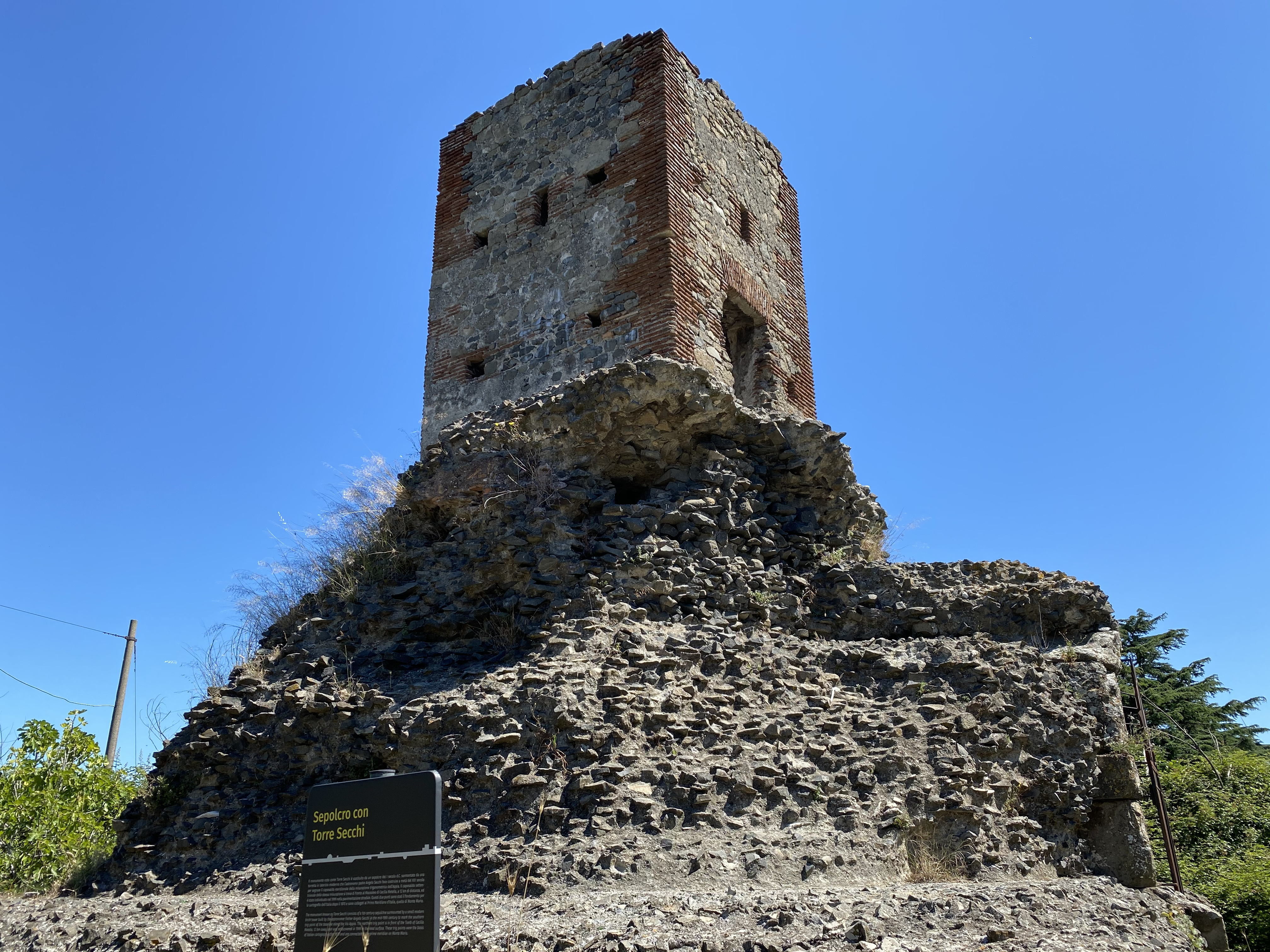 Torre sull’Appia antica a Frattocchie